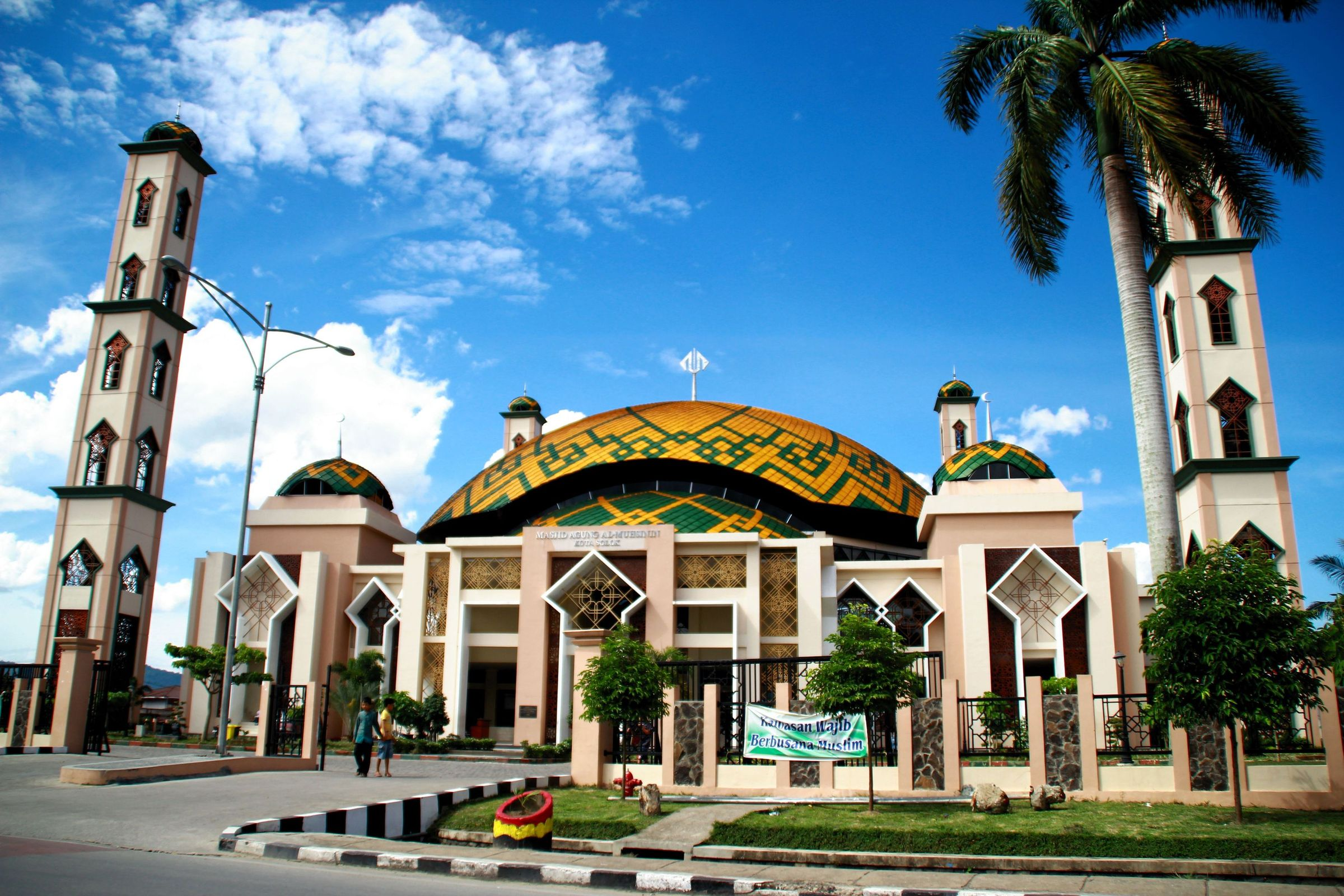 Masjid Agung Solok